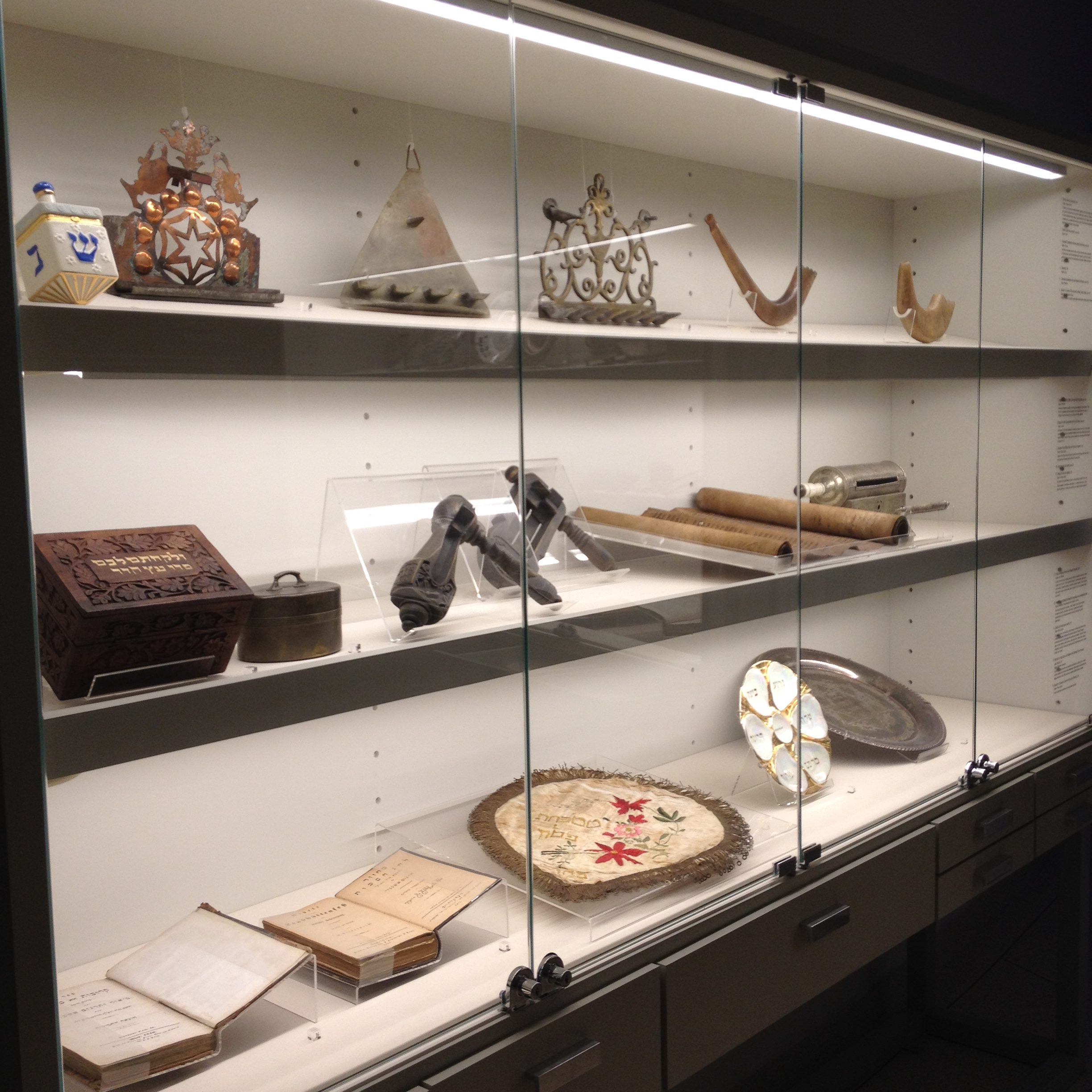 Parte do acervo do Memorial da Imigração Judaica, obtido por doações..